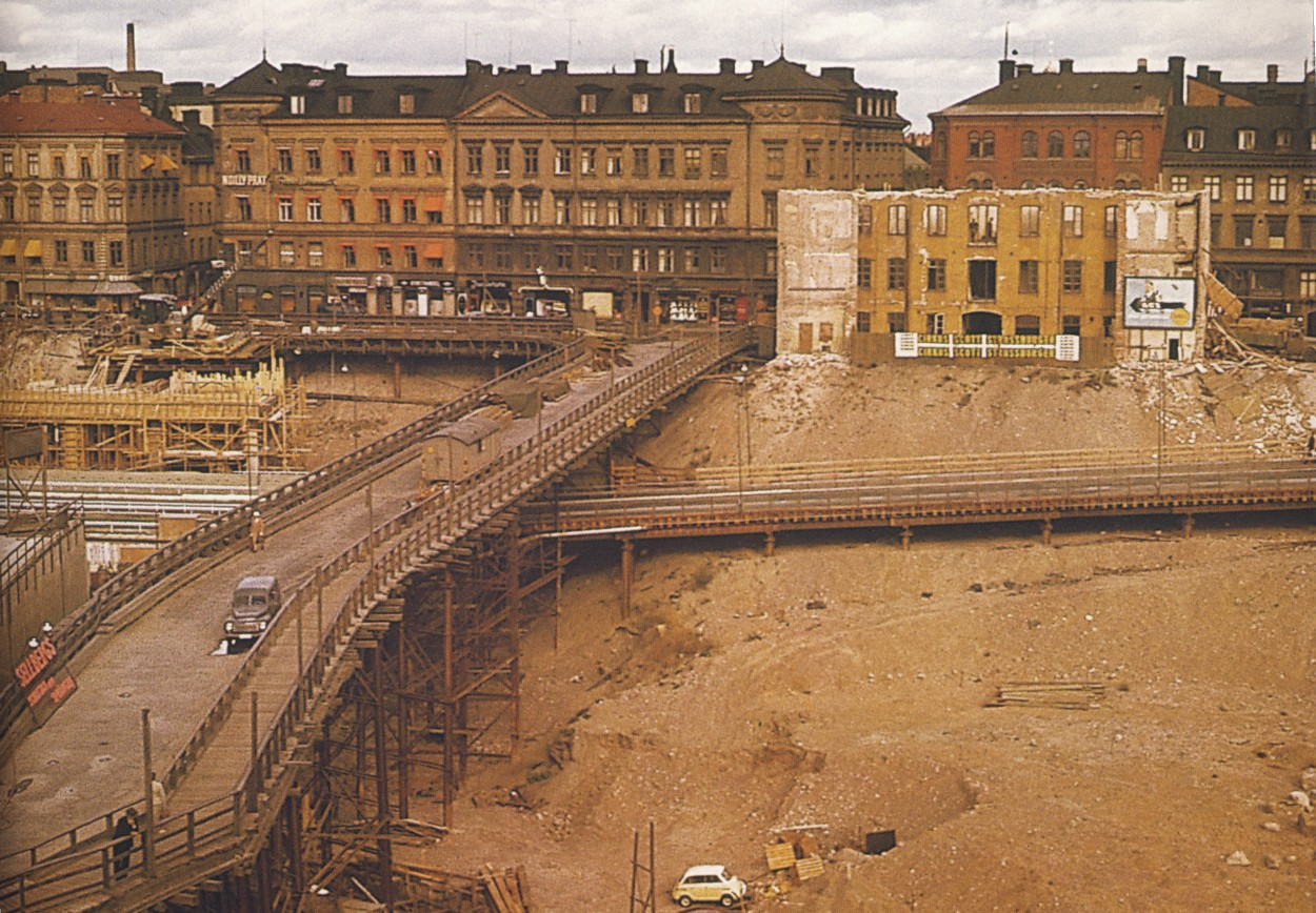 Mäster Samuelsgatan i Stockholm 1959. Mäster Samuelsgatan förs öven en provisorisk bro österut mot Malmskillnadsgatan.